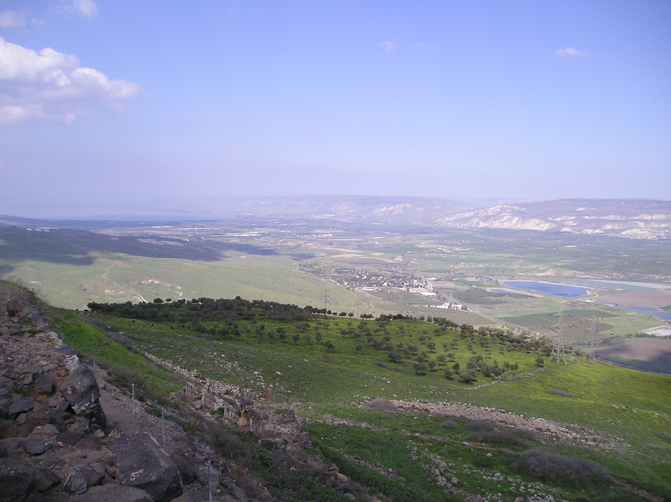 Belvoir (twierdza) - Teren izraelskiego parku narodowego. Widok z Belvoir na Golan i Jezioro Genezaret.